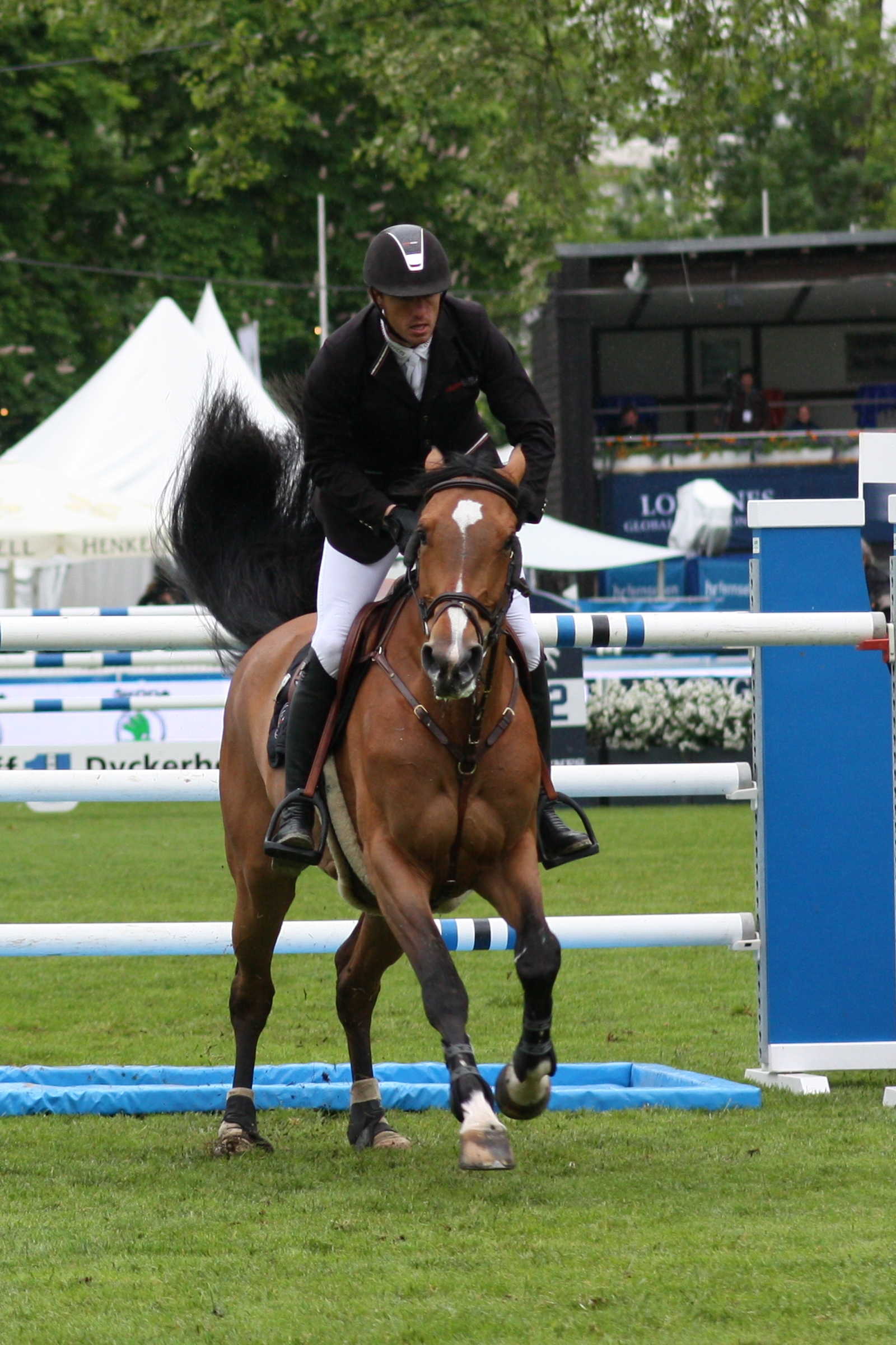 77. Internationanles Wiesbadener Pfingstunier 2013, CSI***** Eröffnungsspringen, Gregory Wathelet auf Citizenguard Cadjanine Z Personality rights warningAlthough this work is freely licensed or in the public domain, the person(s) shown may have rights that legally restrict certain re-uses unless those depicted consent to such uses. In these cases, a model release or other evidence of consent could protect you from infringement claims.